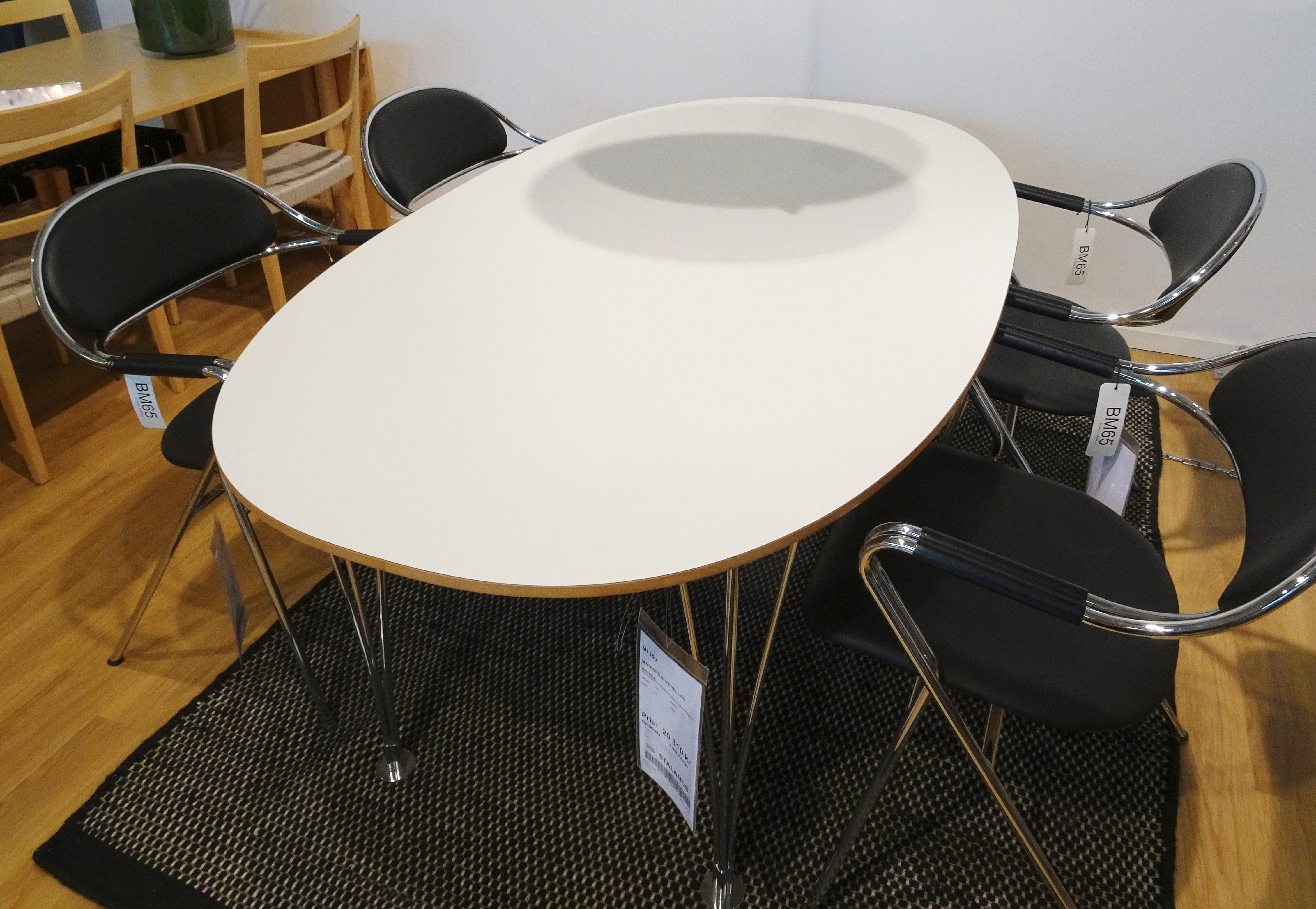 Bruno Mathsson, "Superellips" med stolar "BM 65"